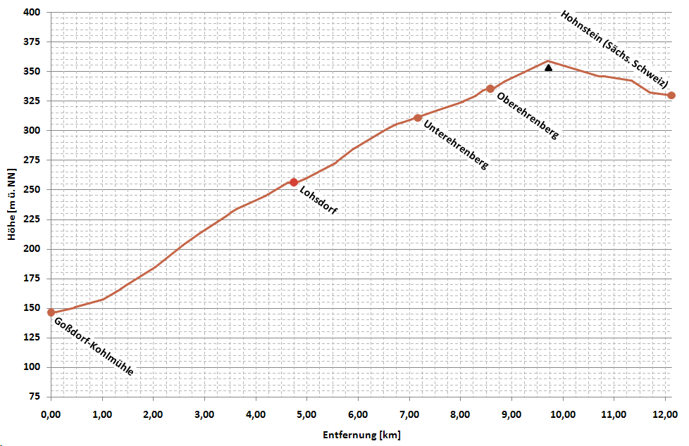 vereinfachtes Höhenprofil der Strecke Goßdorf-Kohlmühle - Hohnstein (Sächs. Schweiz)